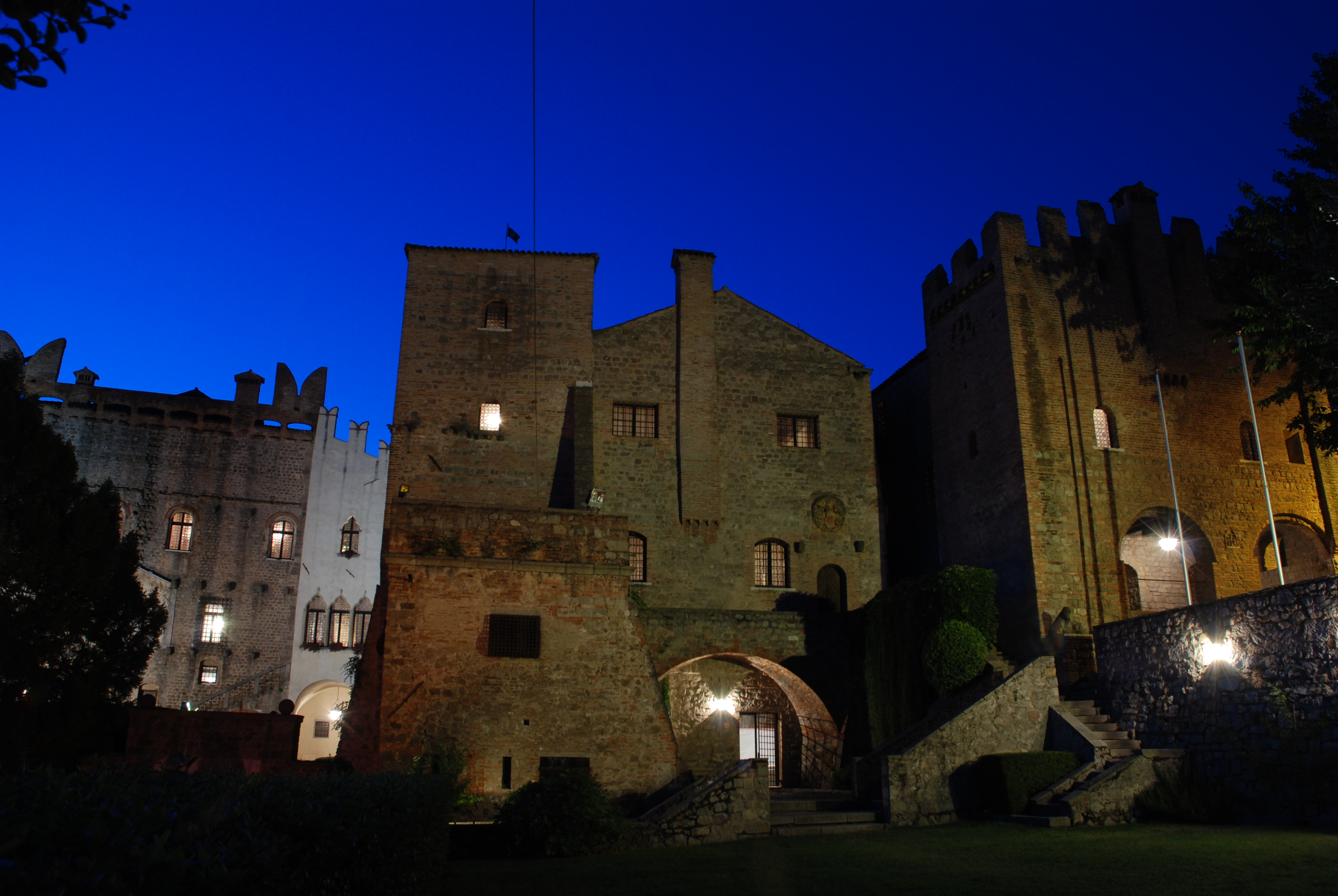 Notturno al Castello di Monselice